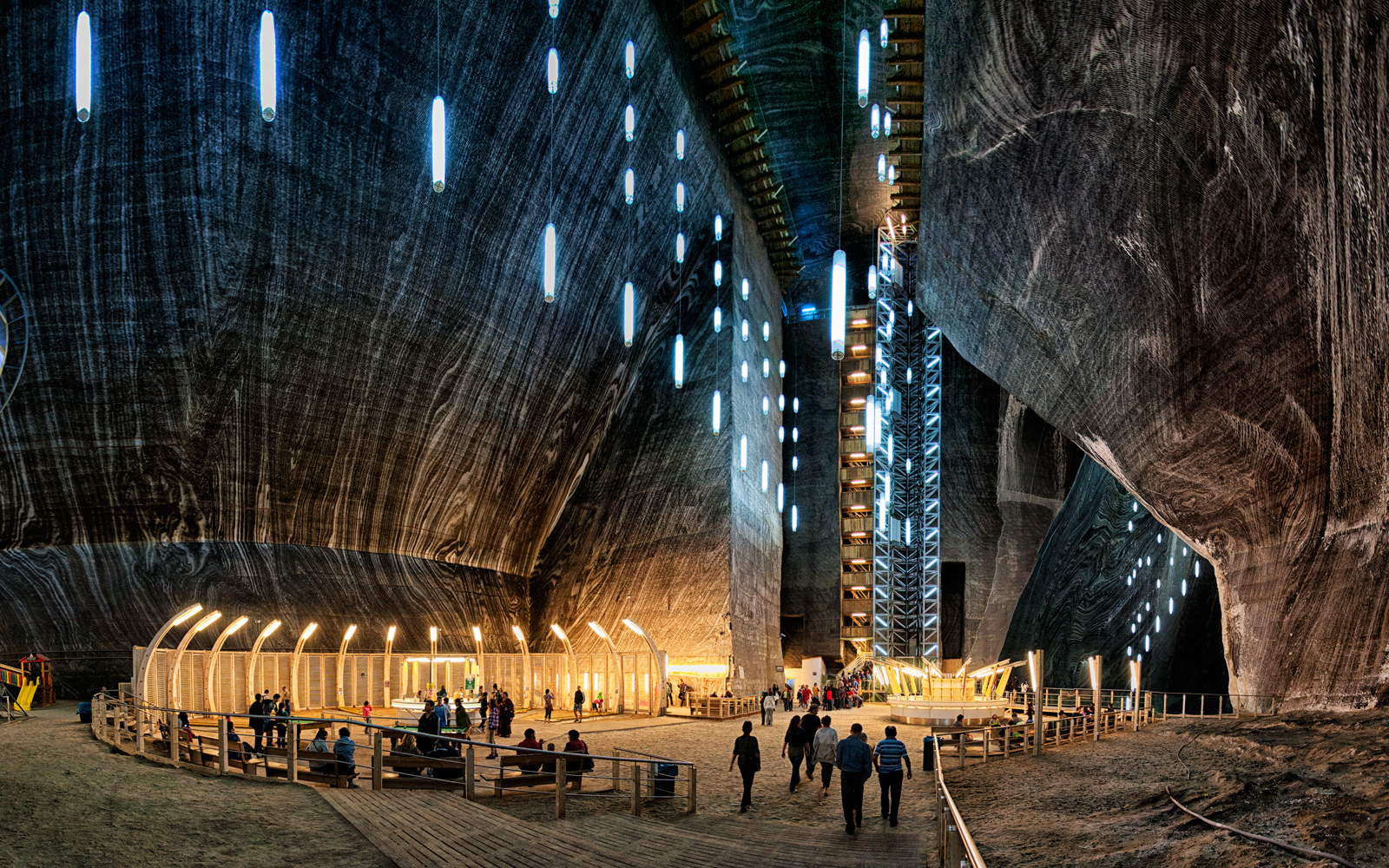 Interiorul salinei.Mina Rudolf.